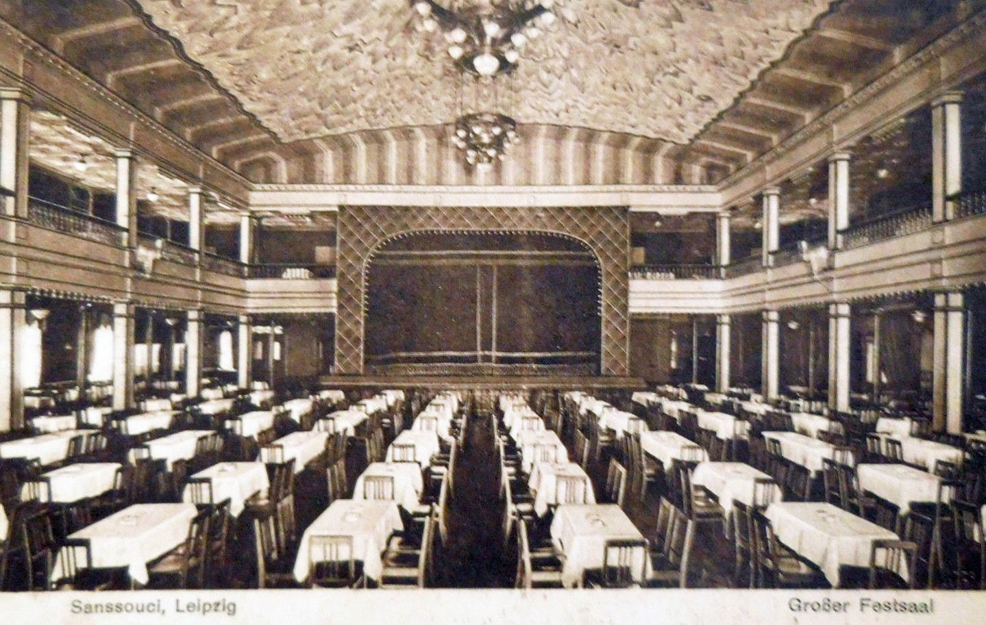 Festsaal im "Sanssouci" Leipzig (früher Odeon)